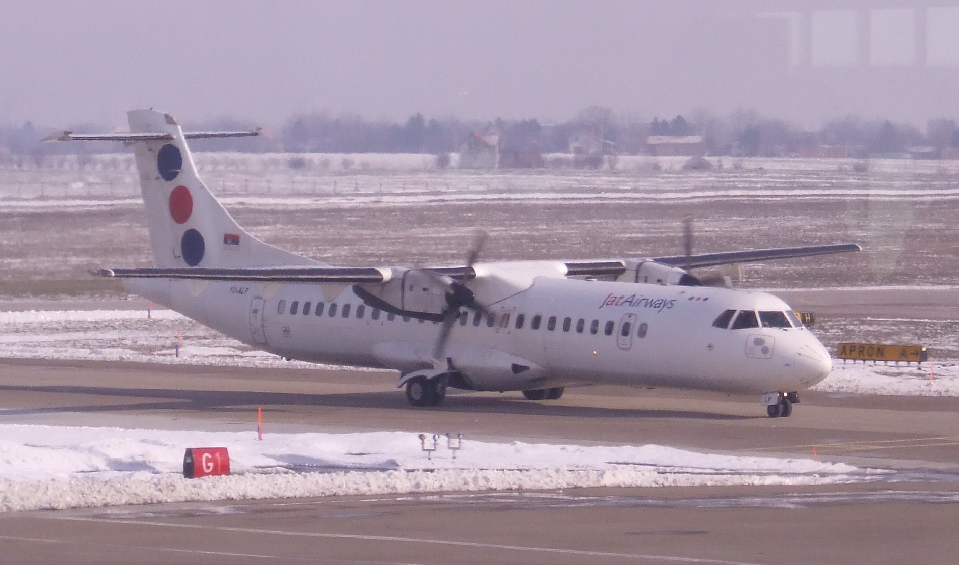 ATR na beogradskom aerodromu u 2010. godini.